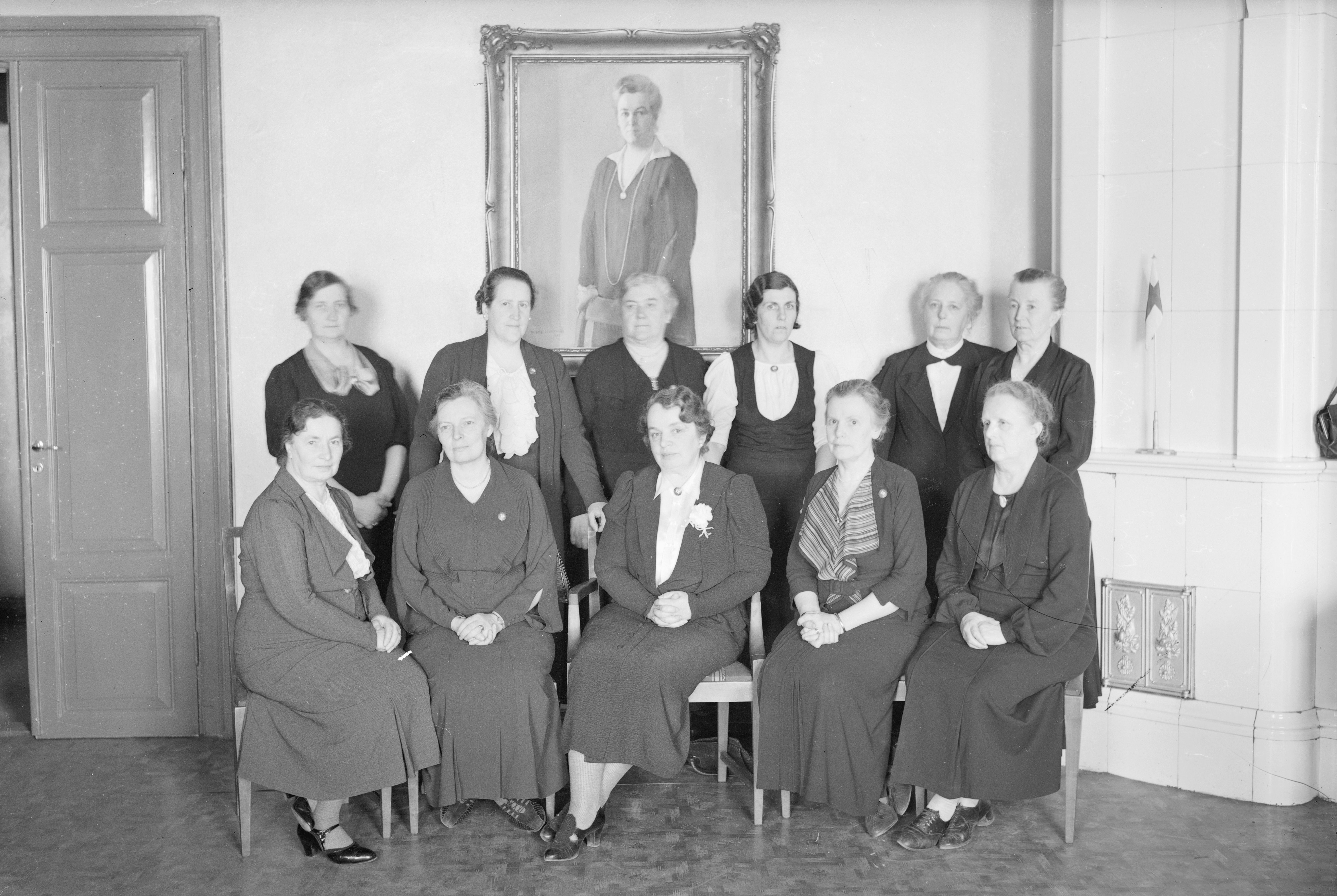 Suomen Sotilaskotiliiton hallitus, edessä keskellä puheenjohtaja Toini Jännes.